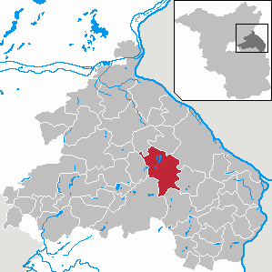 Neuhardenberg in Brandenburg (Country) - District Märkisch-Oderland